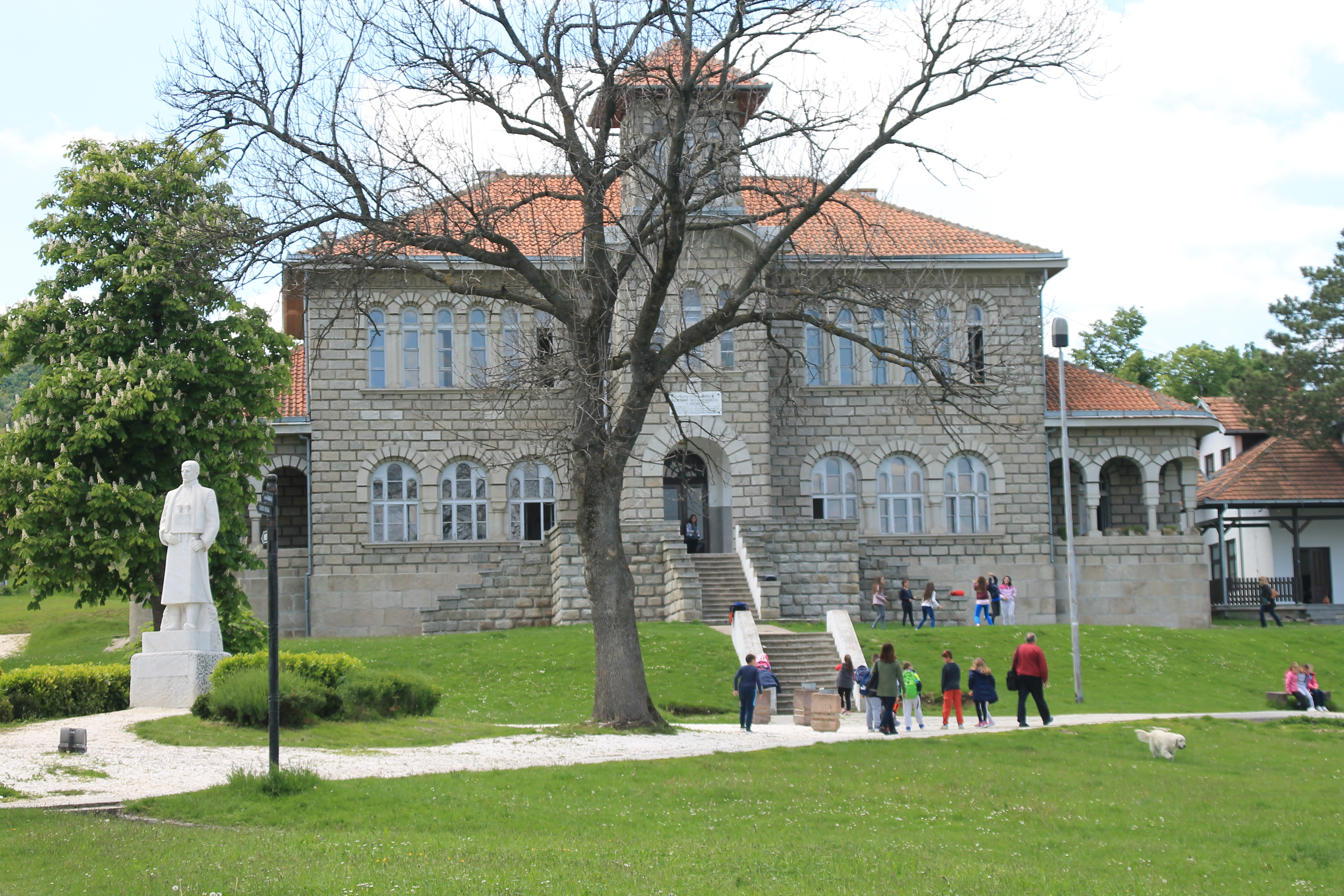 Znamenito mesto Orašac